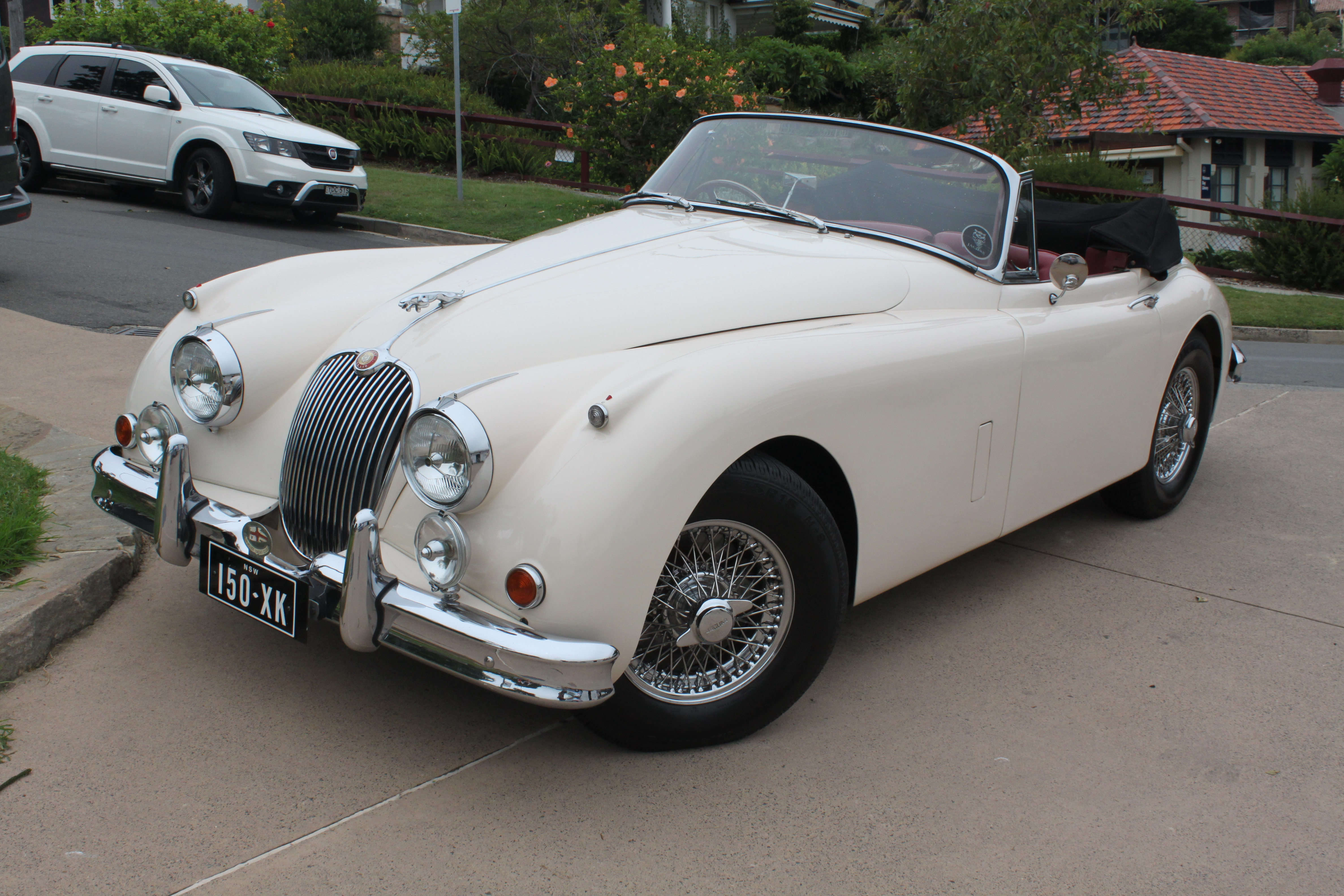 Jaguar XK150